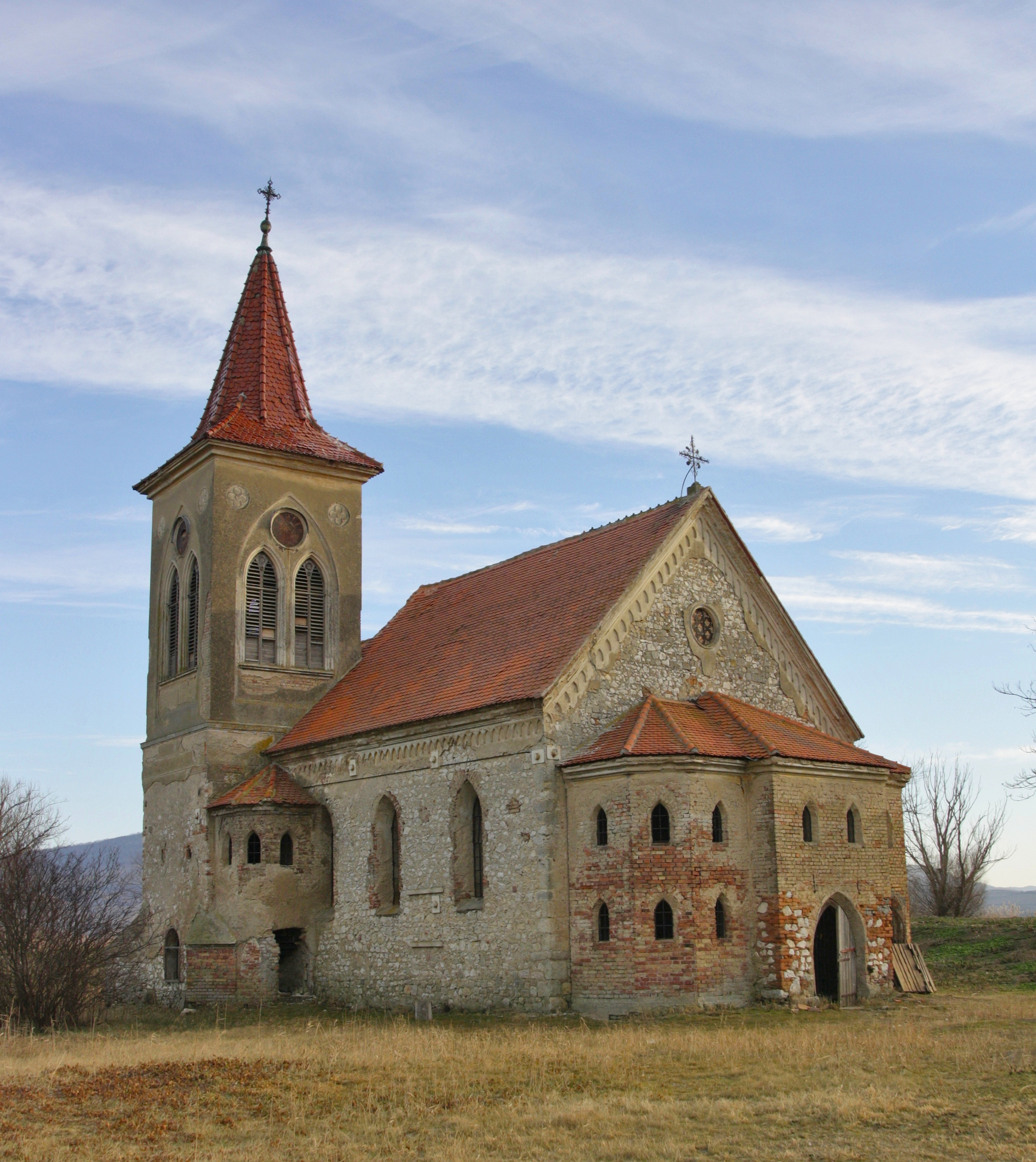 Mušov - kostel svatého Linharta. Pohled od severozápadu.